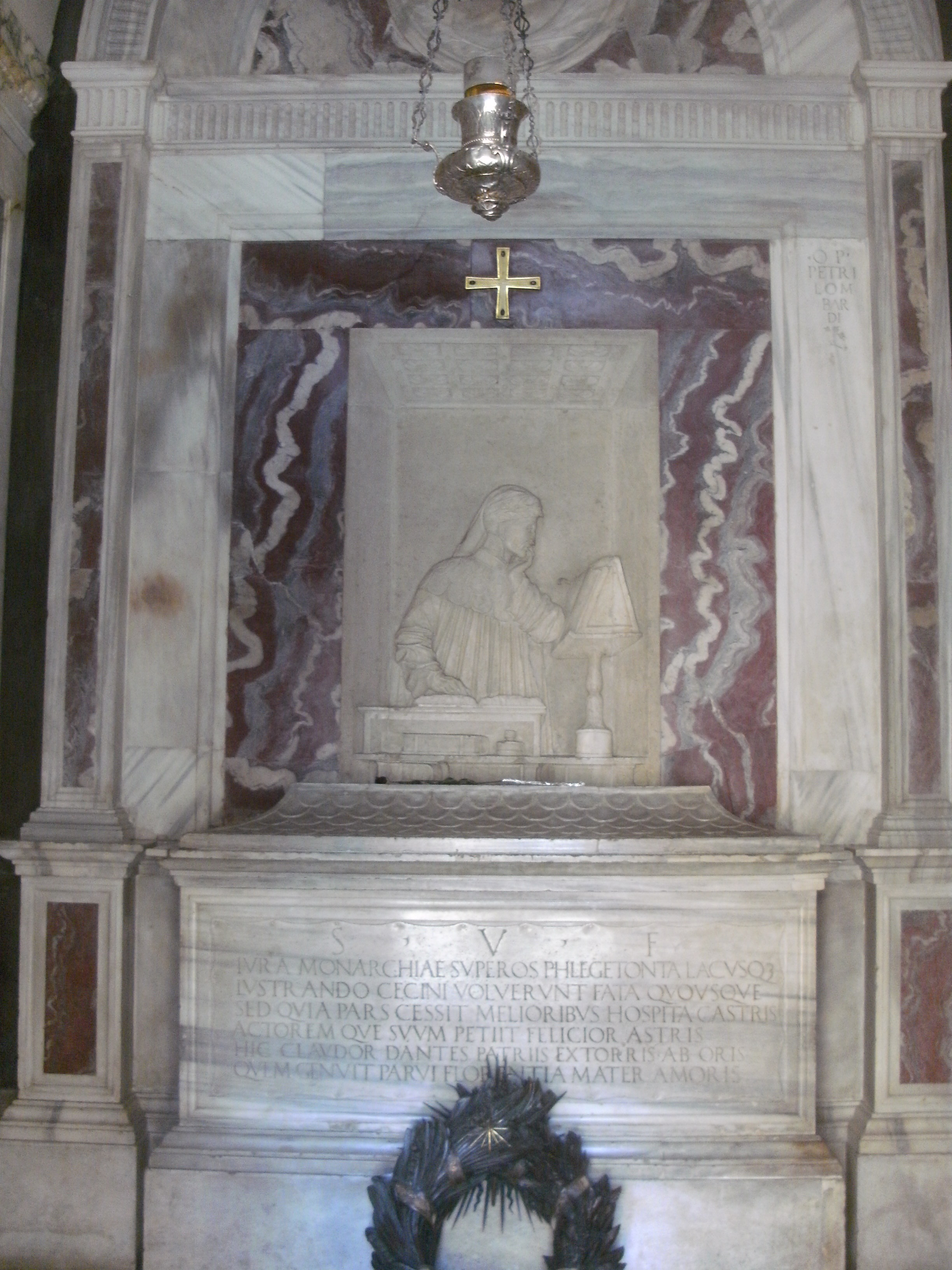 Ravenna, Dante-Grabmal, Sarkophag mit lateinischer Inschrift, darüber ein Marmorfries mit dem Halbbild Dantes